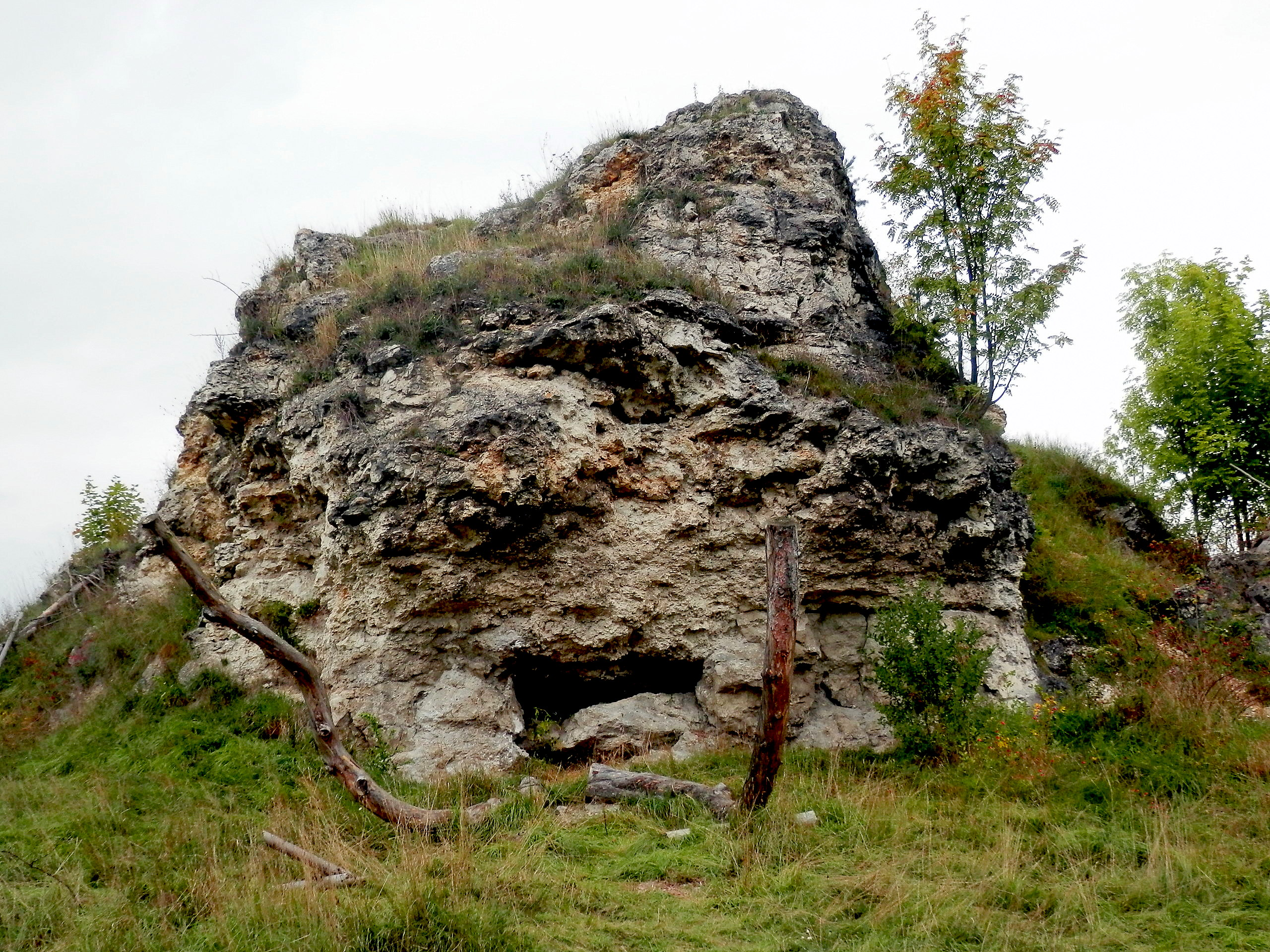 Areál Hrádku. Gánovecký Hrádok je travertínová kopa kde sa v 19.storočí ťažil travertín. V roku 1926 bola v kuse travertínu nájdená časť lebky, vyplnená travertínom. Antropologicky bolo zistené, že ide o vyliatok mozgovne neandertálskeho človeka, ktorý v tejto oblasti žil už pred 105 000 rokmi.